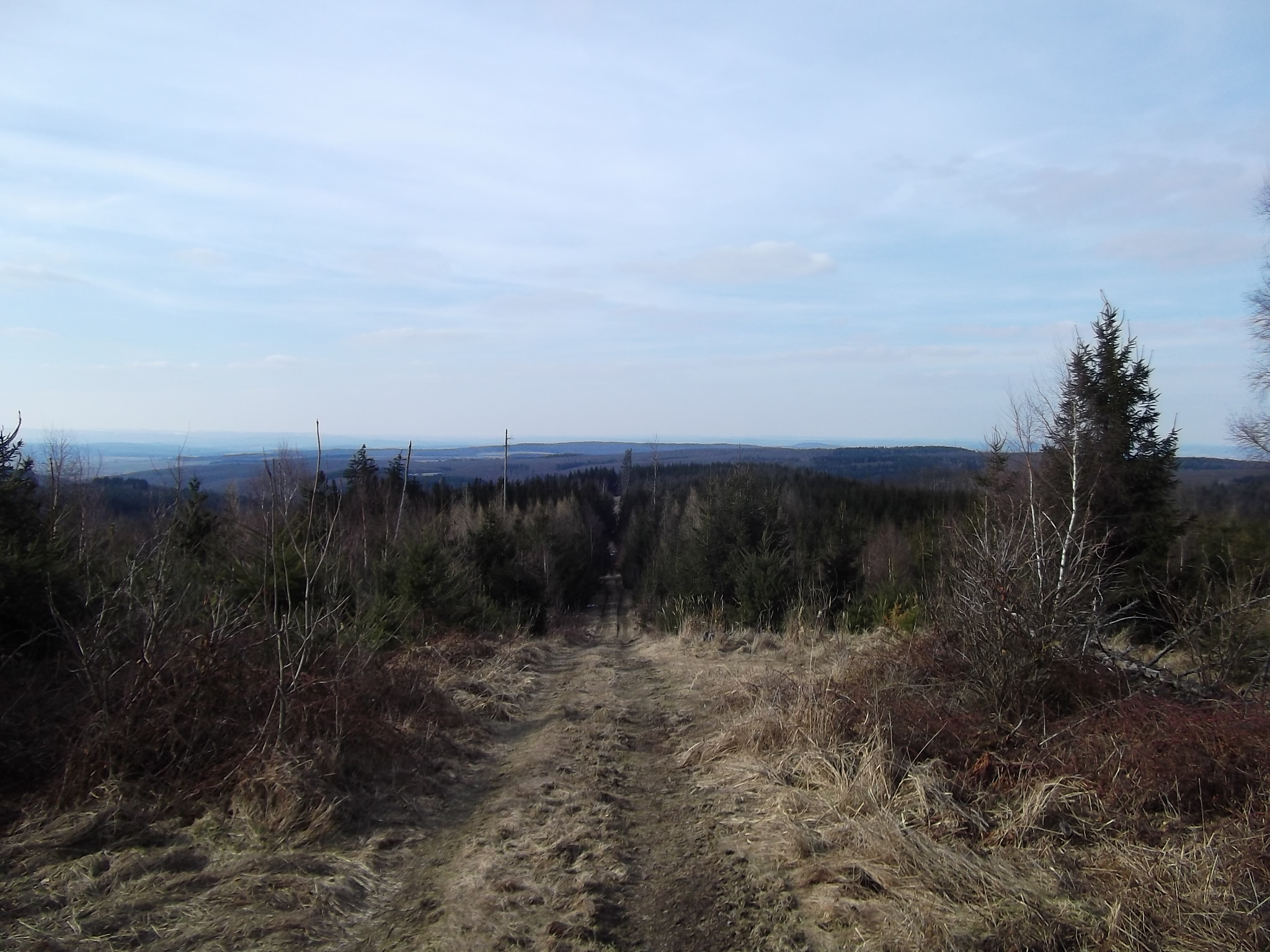 Aussicht vom Gickel Nähe Bodenrod